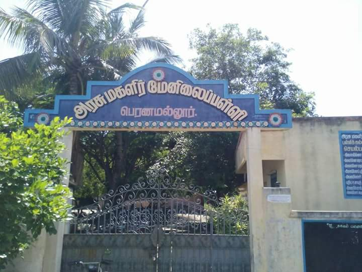 அரசு பெண்கள் மேனிலைப்பள்ளி - பெரணமல்லூர்